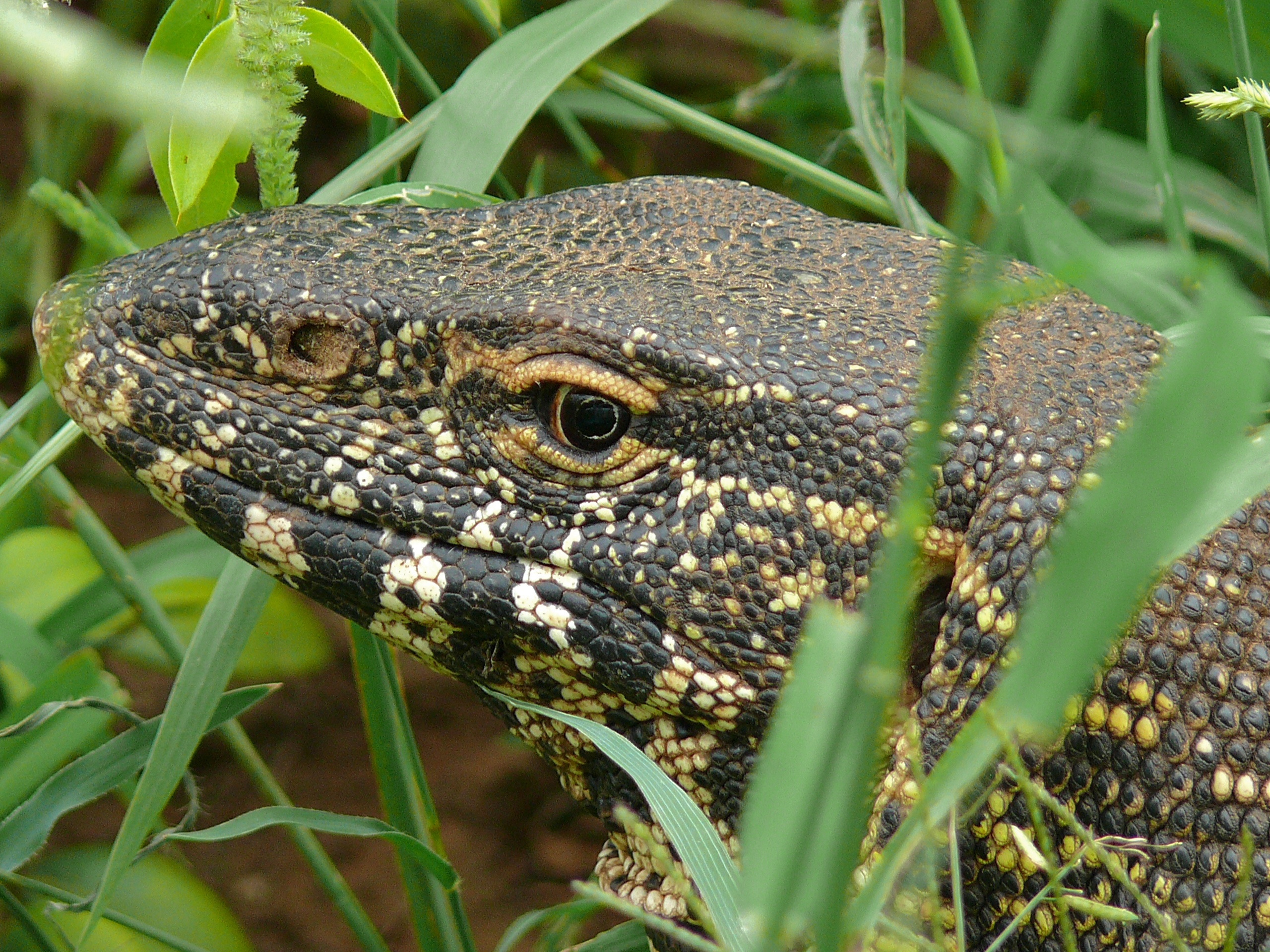 S63 near Pafuri, Kruger NP, SOUTH AFRICA